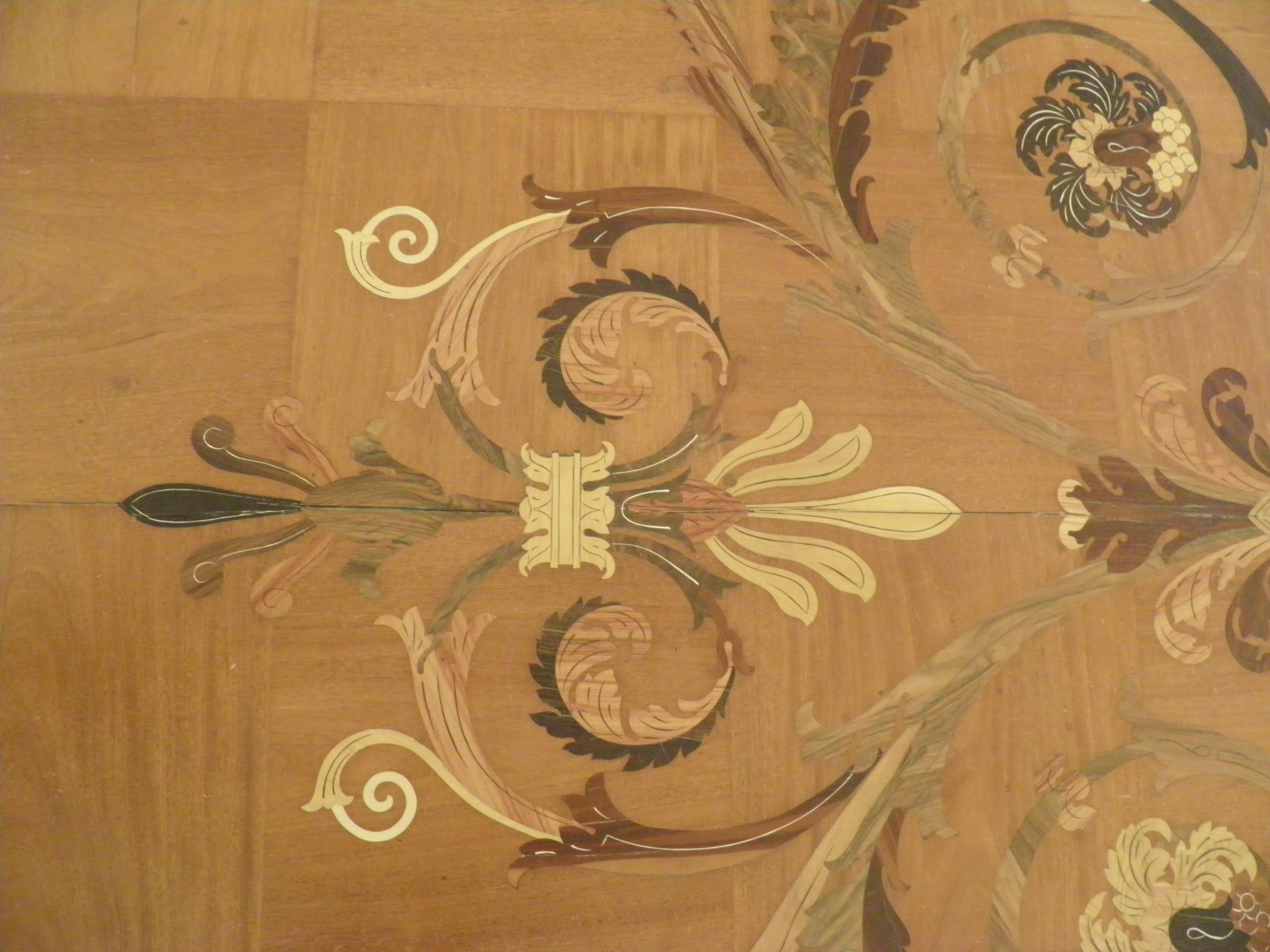 Sol du hall Saint-Georges au musée de l'Ermitage à Saint-Pétersbourg (Russie).